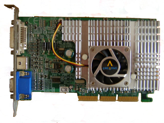 Radeon 7500LE Taken by CY at 12:04, 29 December, 2005